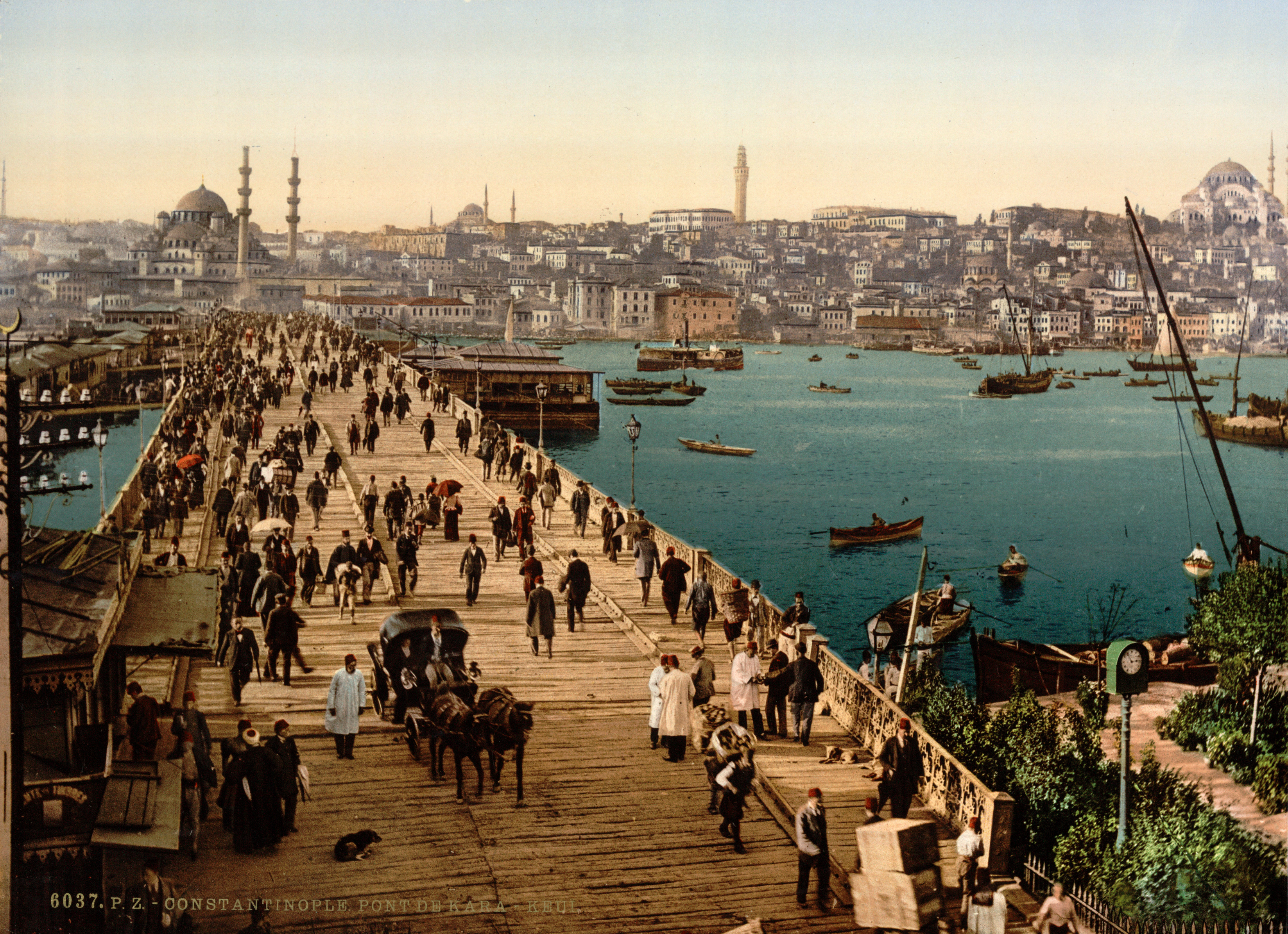 Kara-Keui (Galata) bridge, Constantinople, Turkey